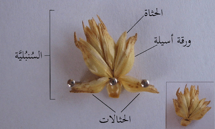 سُنبُليَّة القمح (Triticum aestivum).